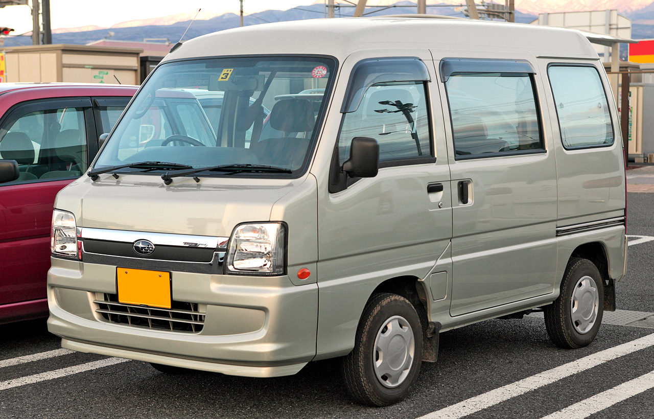 Subaru Sambar Dias Van ('05 11 - '09 09)